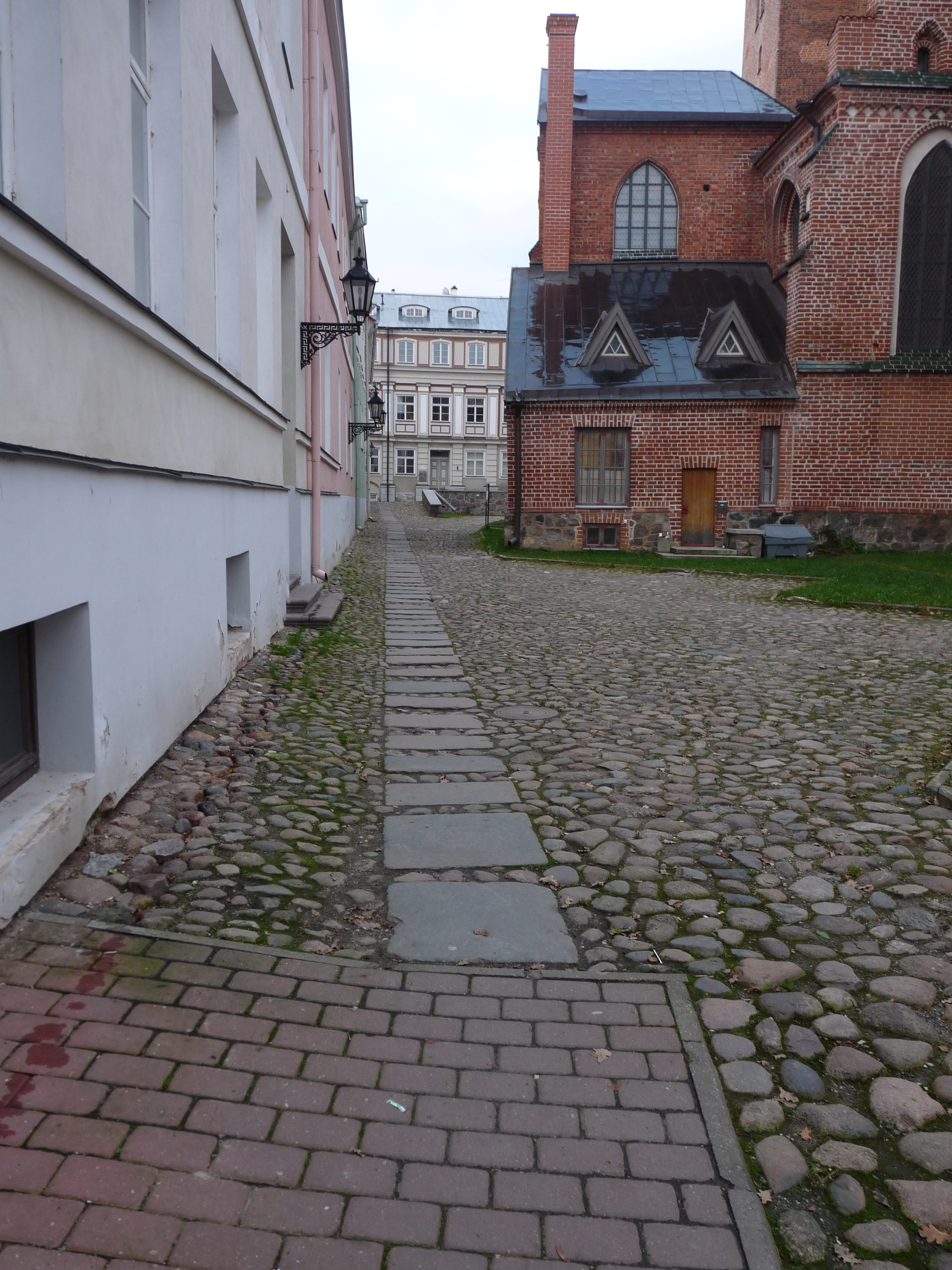 Lüübeki tänav Tartus, vaade Rüütli tänavalt. Vasemal Hugo Treffneri Gümnaasiumi hoone, paremal Jaani kirik, otse Academia Gustavia kunagine peahoone, 23. oktoober 2012